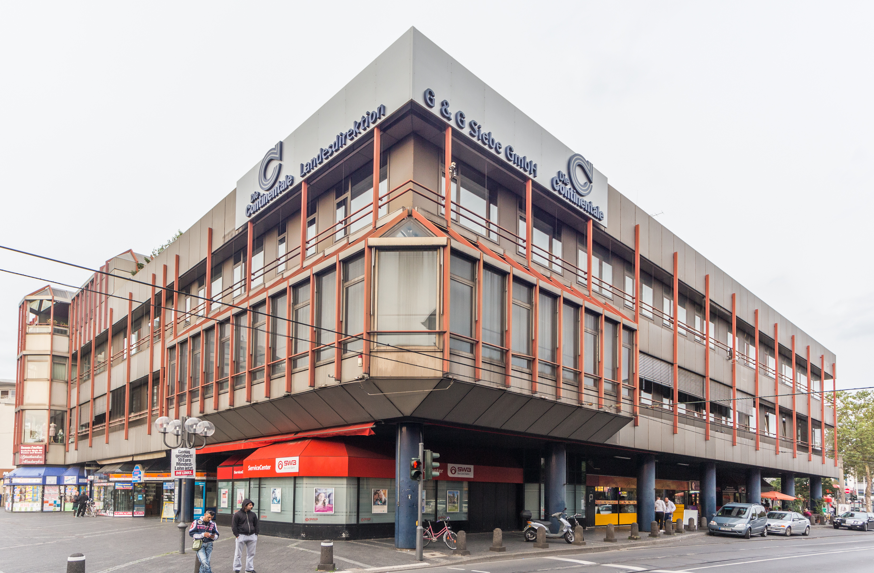 Südüberbauung, Bahnhofsvorplatz, district Zentrum: viewing direction northeast